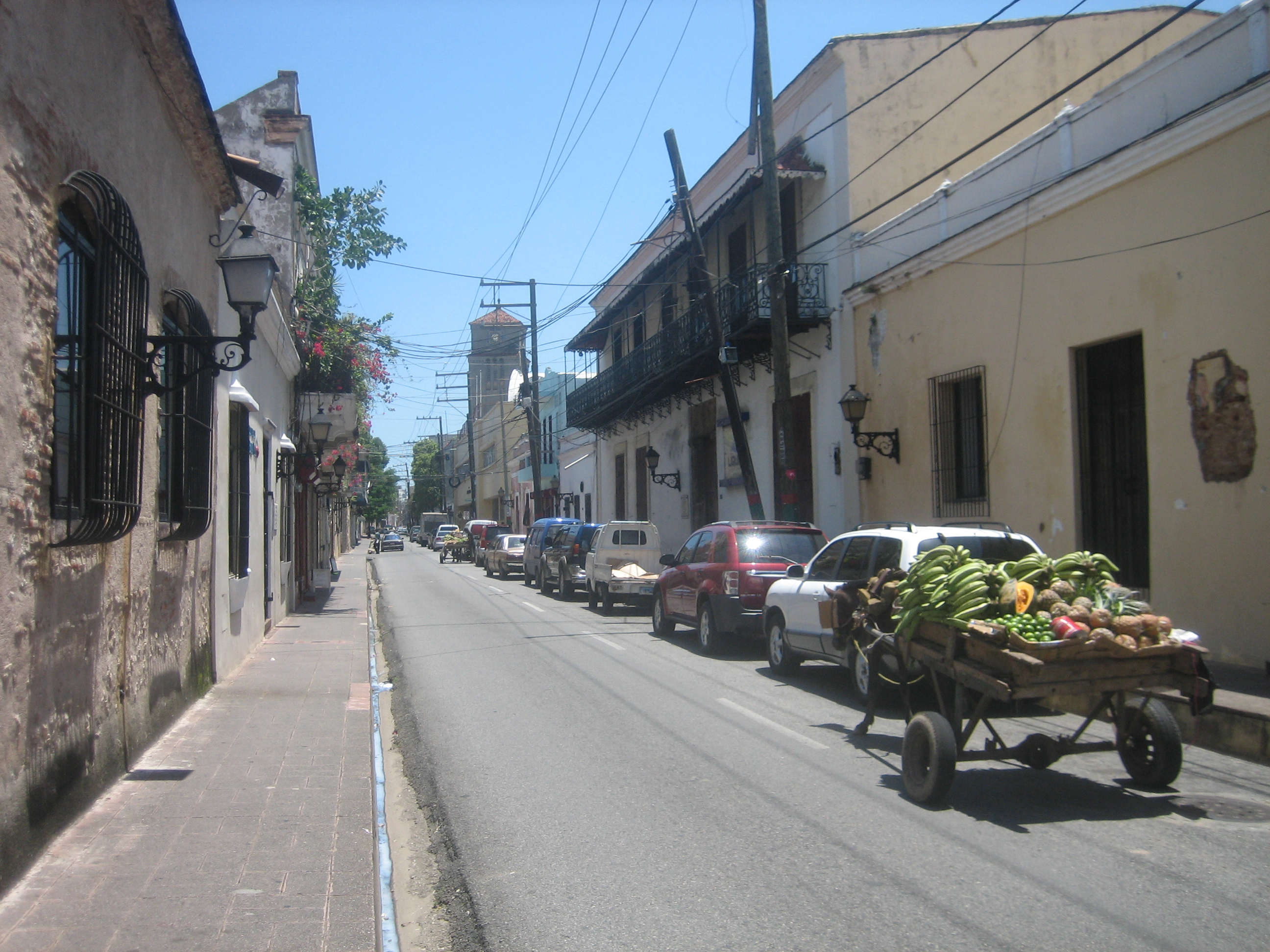 Calle Las Mercedes, Zona Colonial República Dominicna